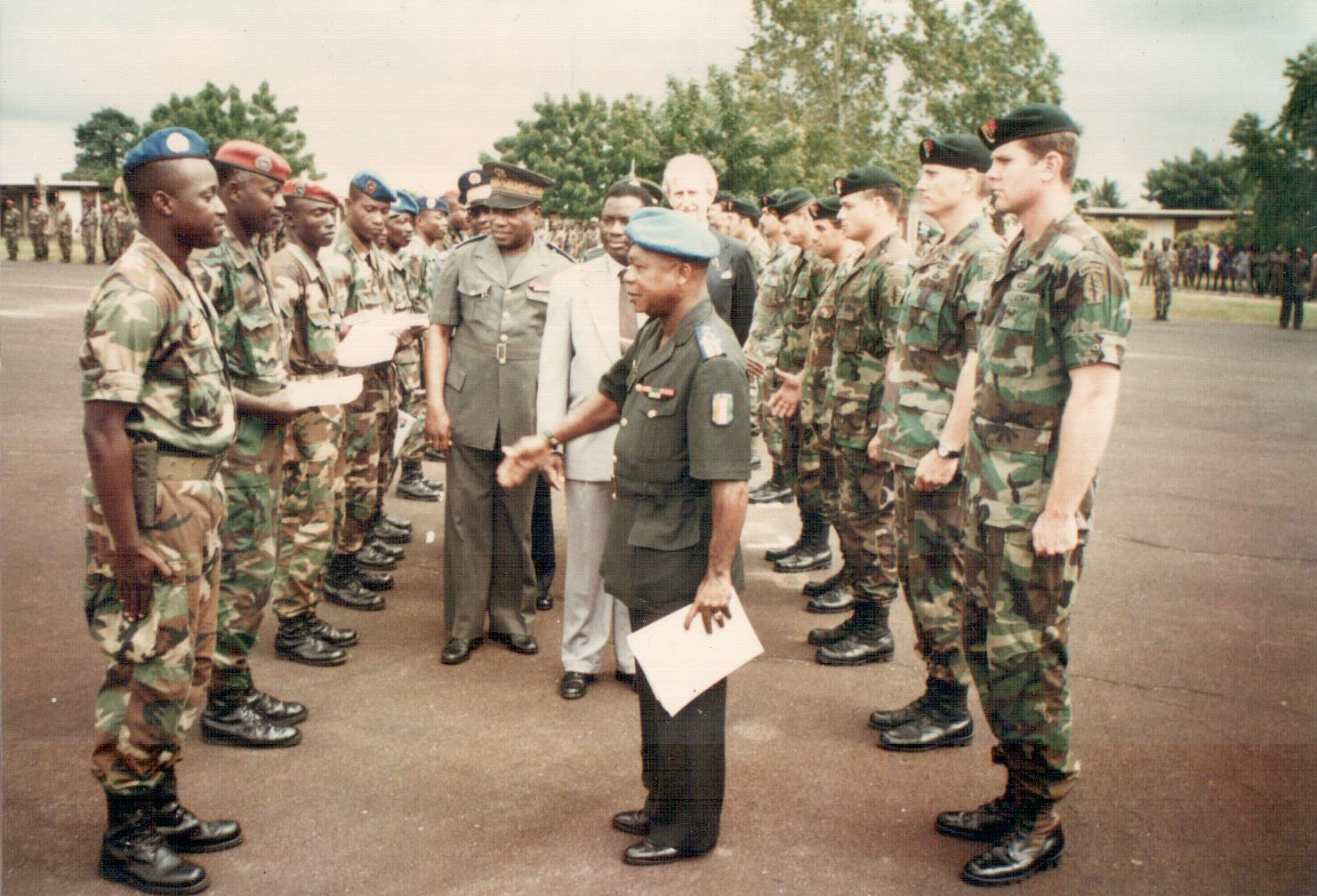 Remise de Diplômes à la manœuvre Ivoiro-Américain